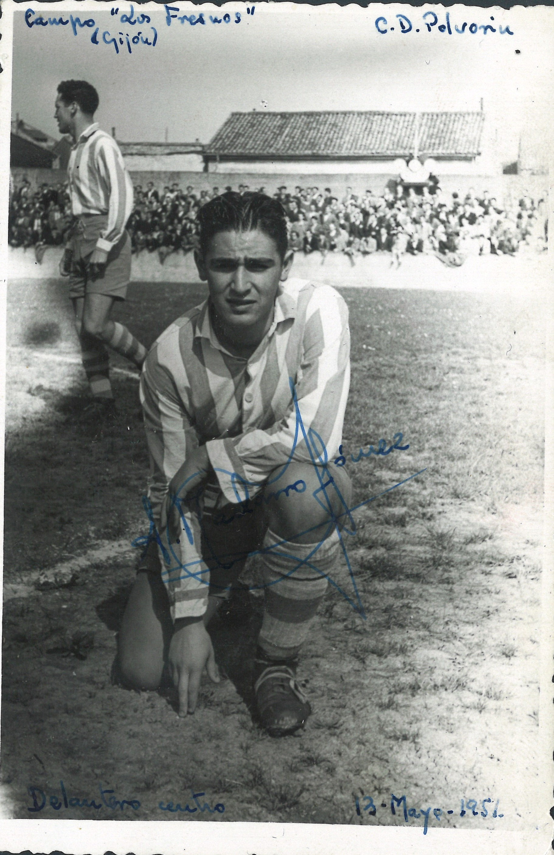 Campo los Fresnos. Gijon